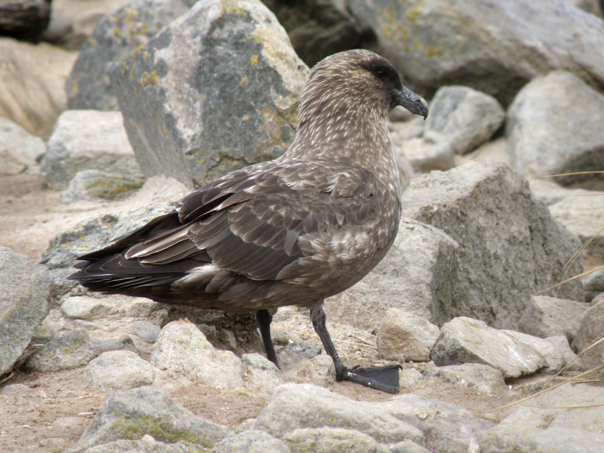 Labbe brun - Stercorarius antarcticus antarcticus - New Island (Îles Malouines)